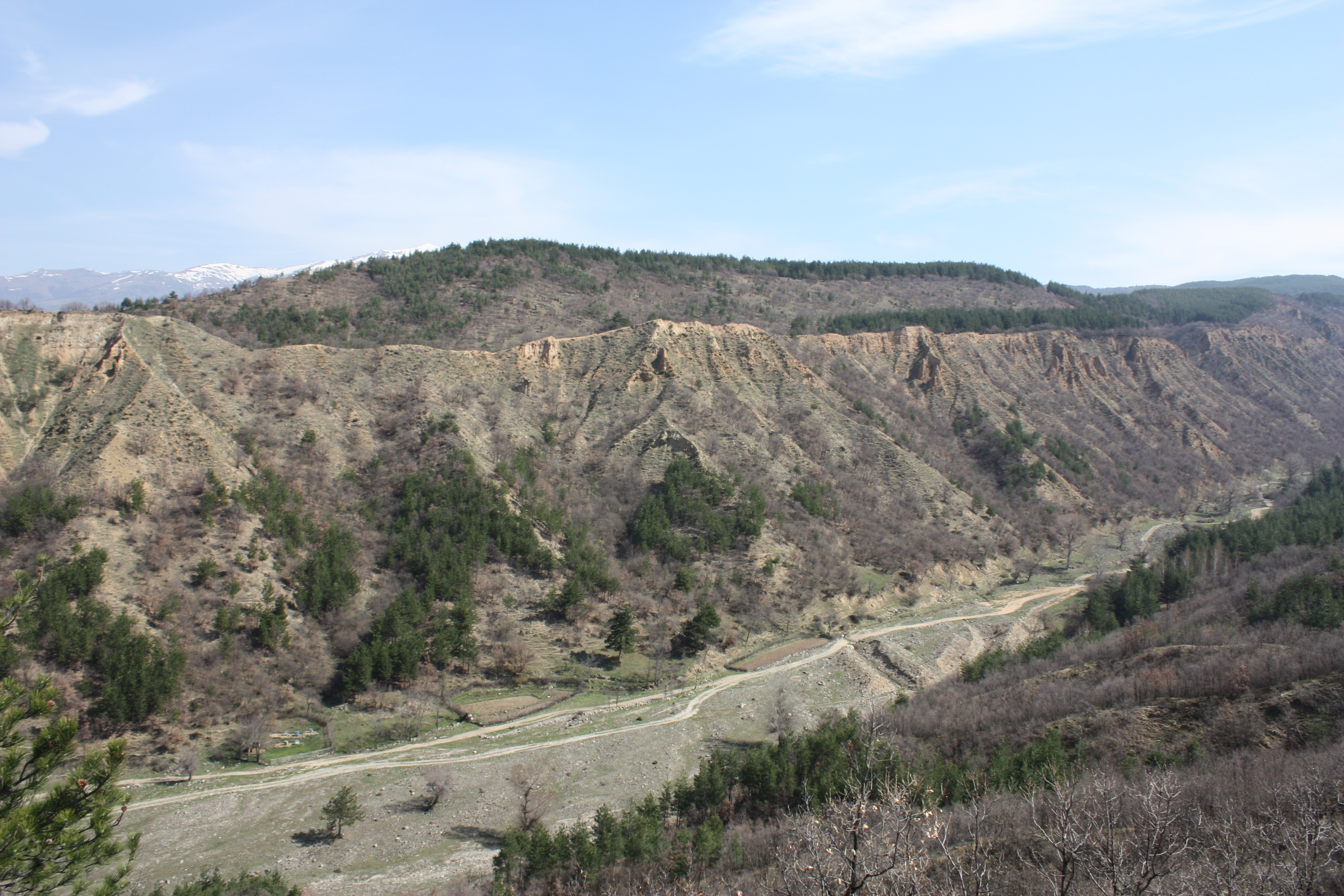 Stob pyramids, Bulgaria